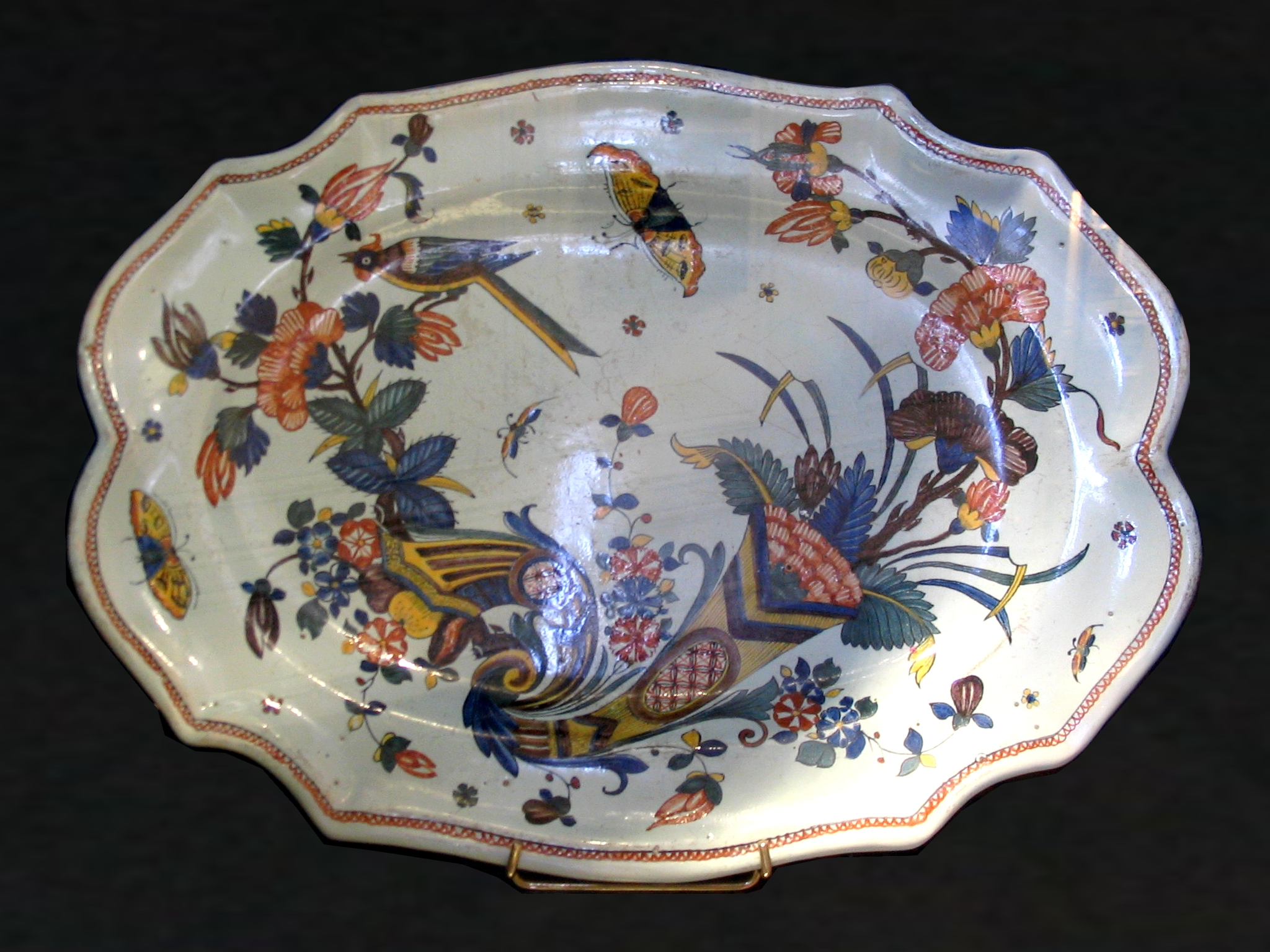 Plat en faïence de Rouen, France, XVIIIe siècle, Musée Lambinet, Versailles